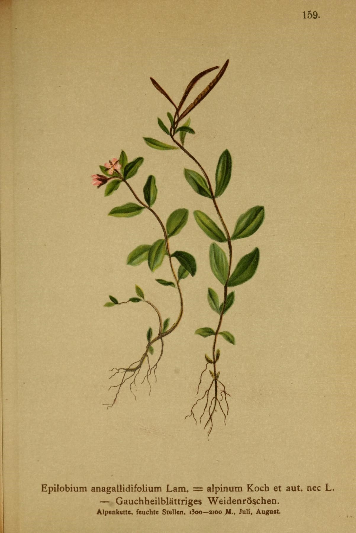 159. Epilobium anagallidifolium Lam. = alpinum Koch et aut. nee L. — Gauchheilblättriges Weidenröschen. Alpenkstte, feuchte Stellen, i3oo— 2100 H-, Juli, Augast.